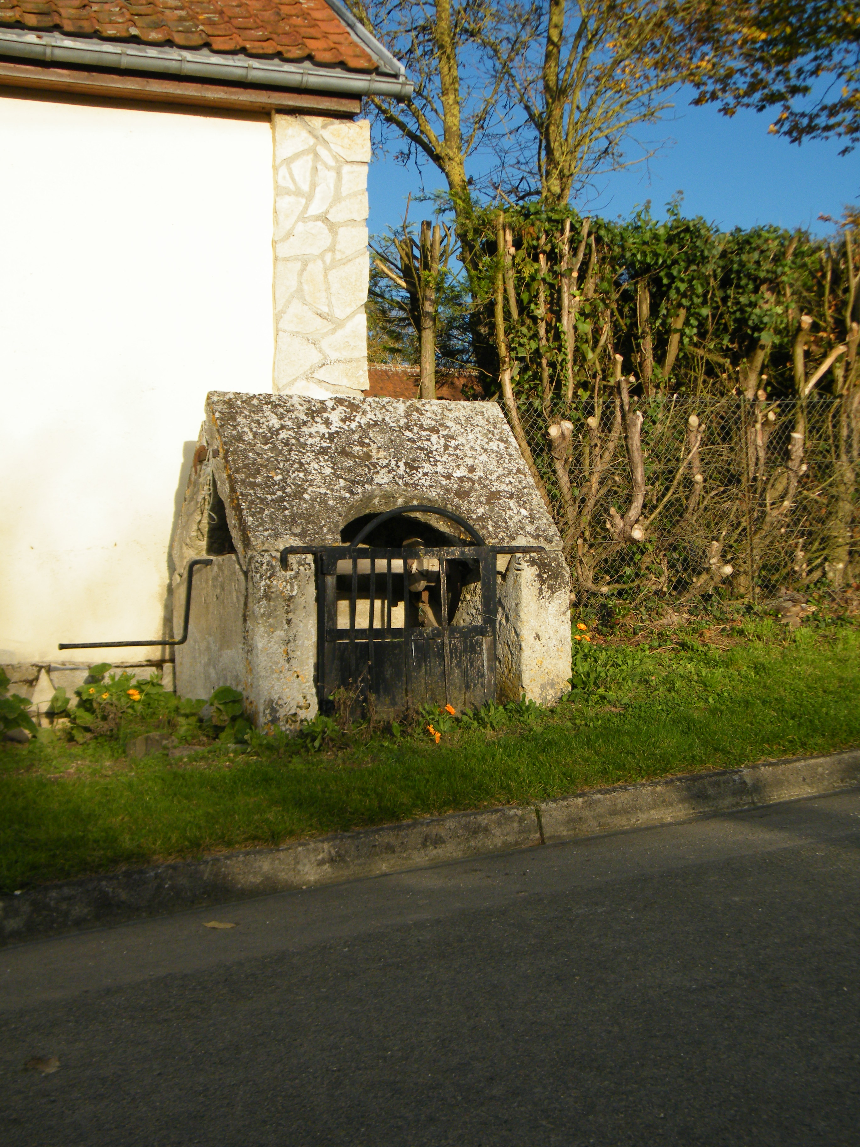 Puits de pierre.